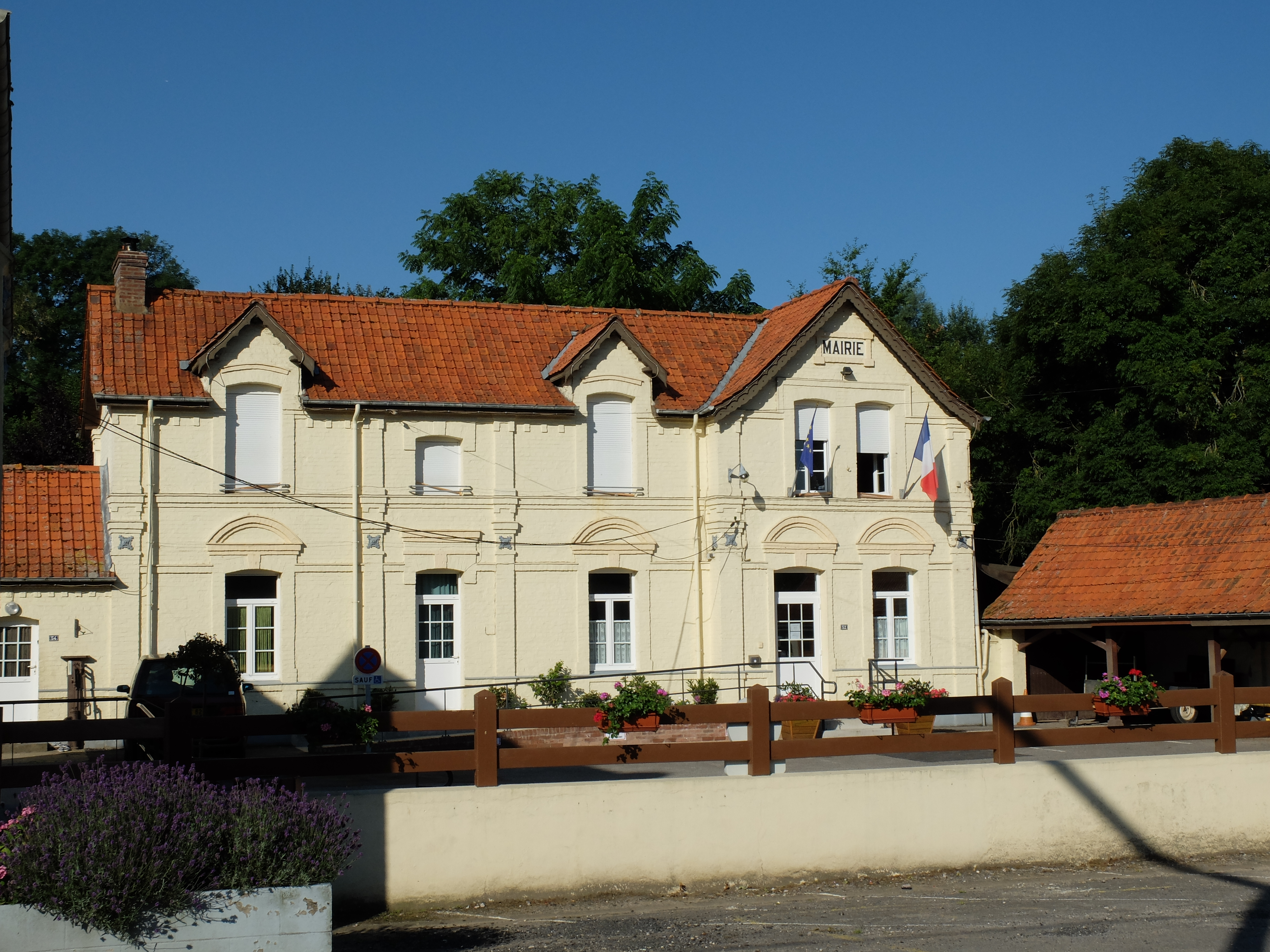 Vue de la mairie de Beaumerie-Saint-Martin.